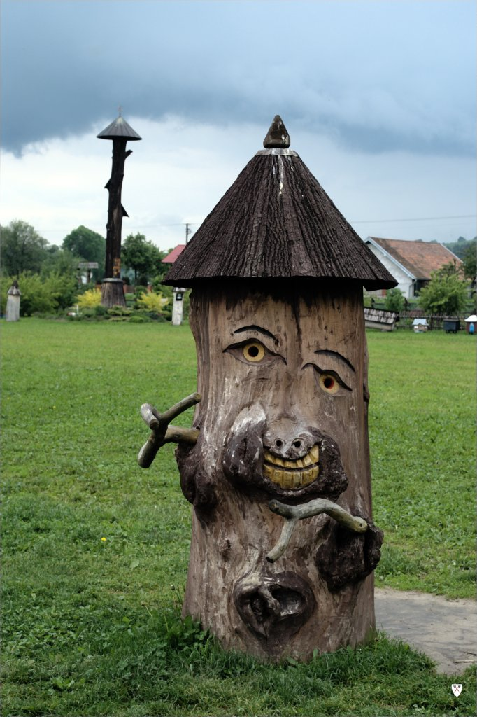 Barć - Skansen Pszczelarstwa w Stróżach, powiat nowosądecki